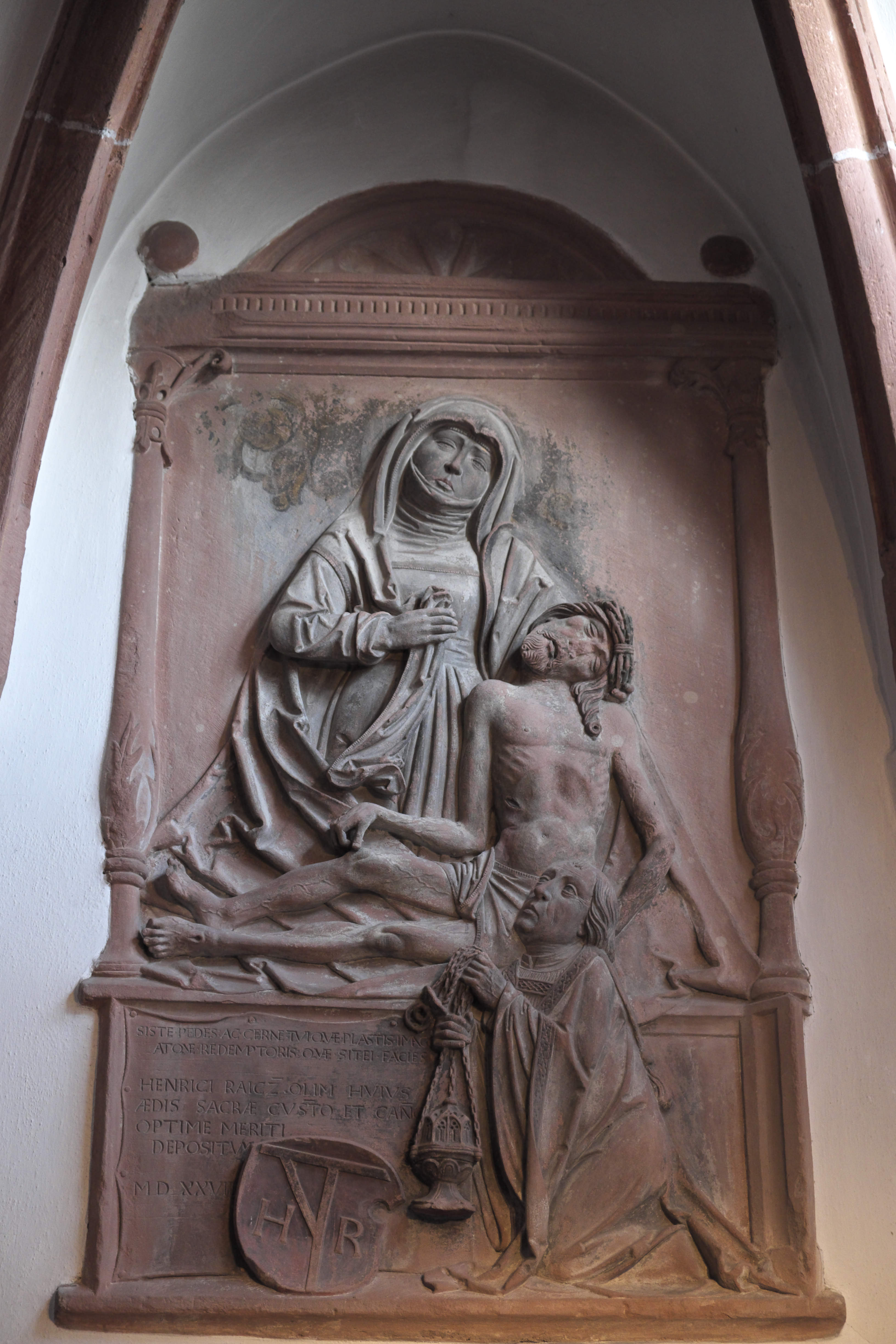 Ehemalige Stiftsbasilika St. Peter und Alexander in Aschaffenburg (Unterfranken/Bayern), Epitaph für Heinrich Reitzmann († 1528)